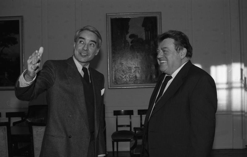 30.1.1987 Der bayerische Ministerpräsident Franz Josef Strauß empfängt den Botschafter der USA in Bonn, Richard Burt, in der Staatskanzlei